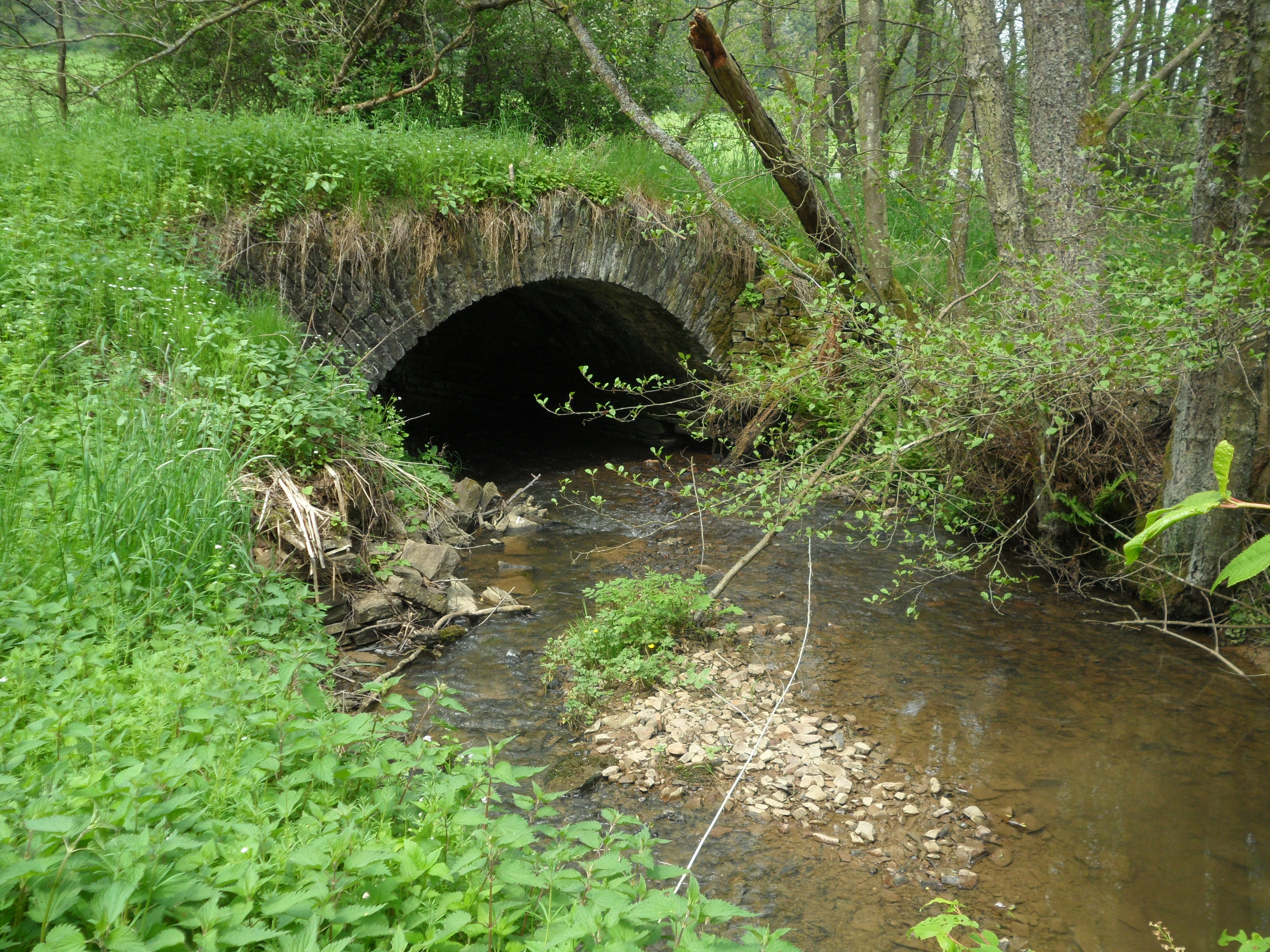 Brücke an der L10, UTM 50.377675,6.866396